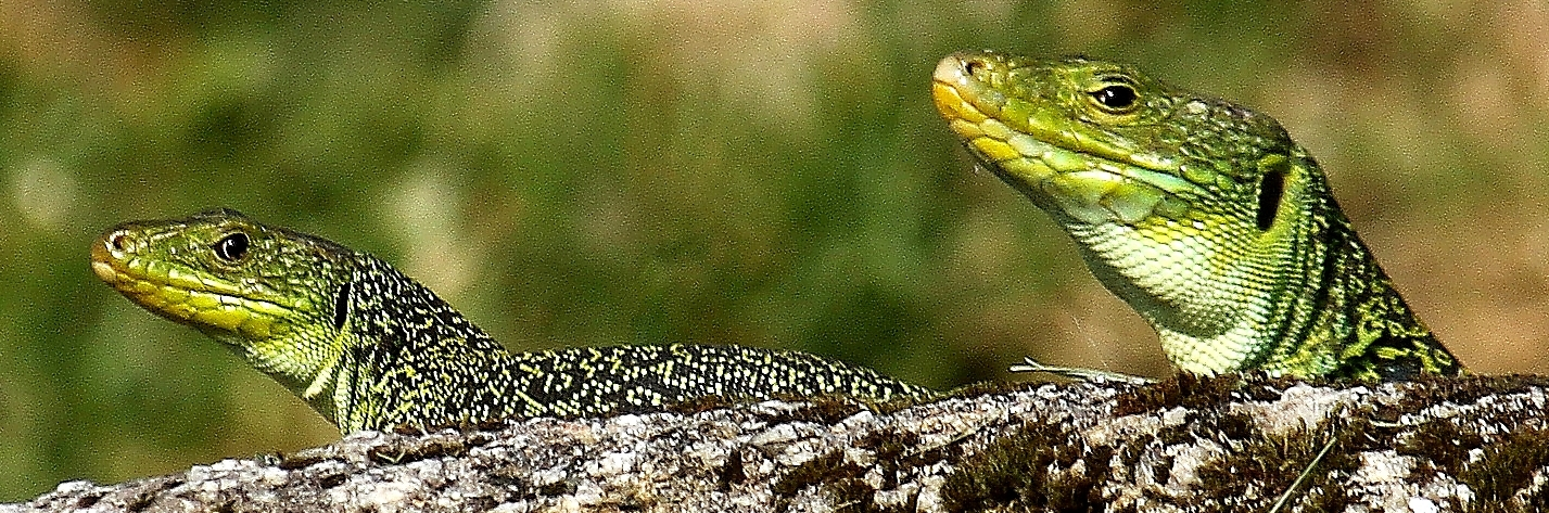 Couple de lézard ocellés male et femelle